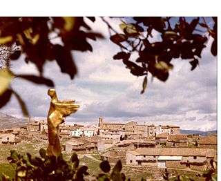 Primer plano del Trofeo de Oro de Misión Rescate con Malanquilla al fondo